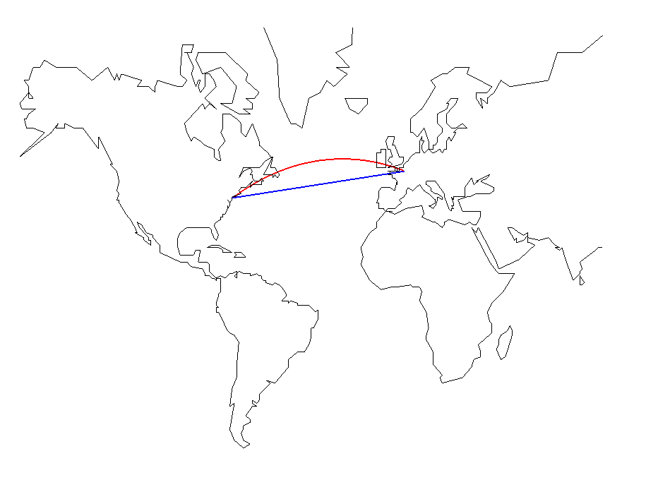 Loxodromie (en bleu) et orthodromie (en rouge) entre Paris et New-York, en projection de Mercator.